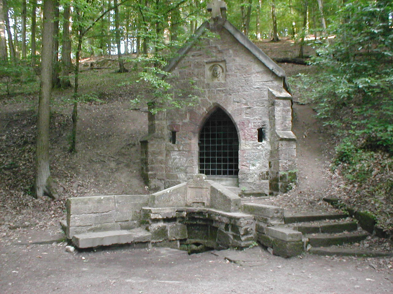 Köpferbrunnen mit Einsiedlerklause im Köpfertal bei Heilbronn